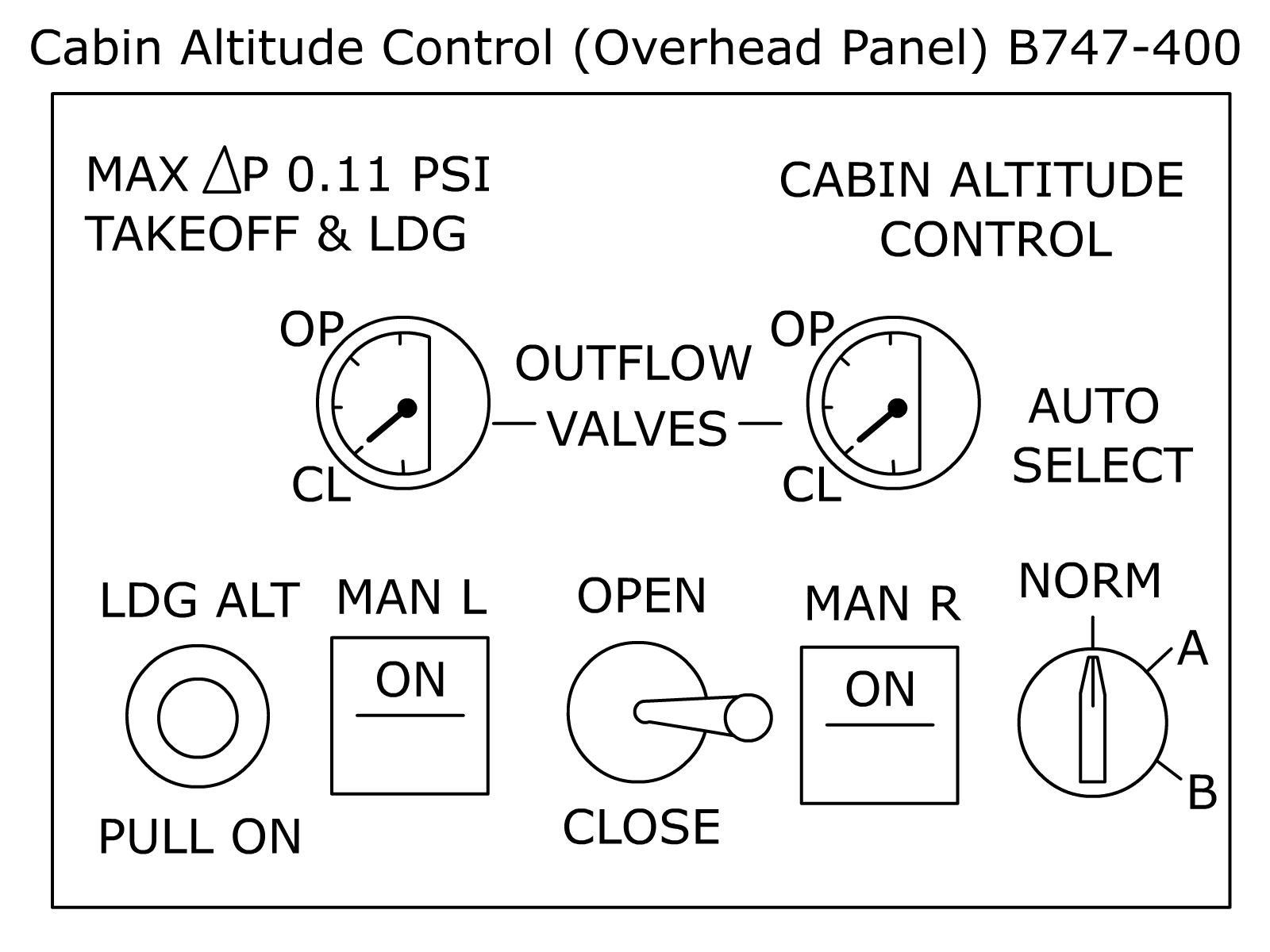 Kontrollbedienfeld für den Kabinendruck - B747